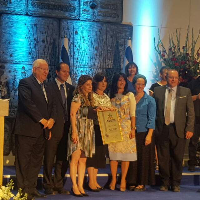 בקבלת הפרס 2016